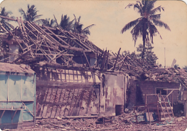 அழிக்கப்பட்ட பாடசாலைகளில் ஒன்றான வல்வை சிவகுரு வித்தியாசாலை